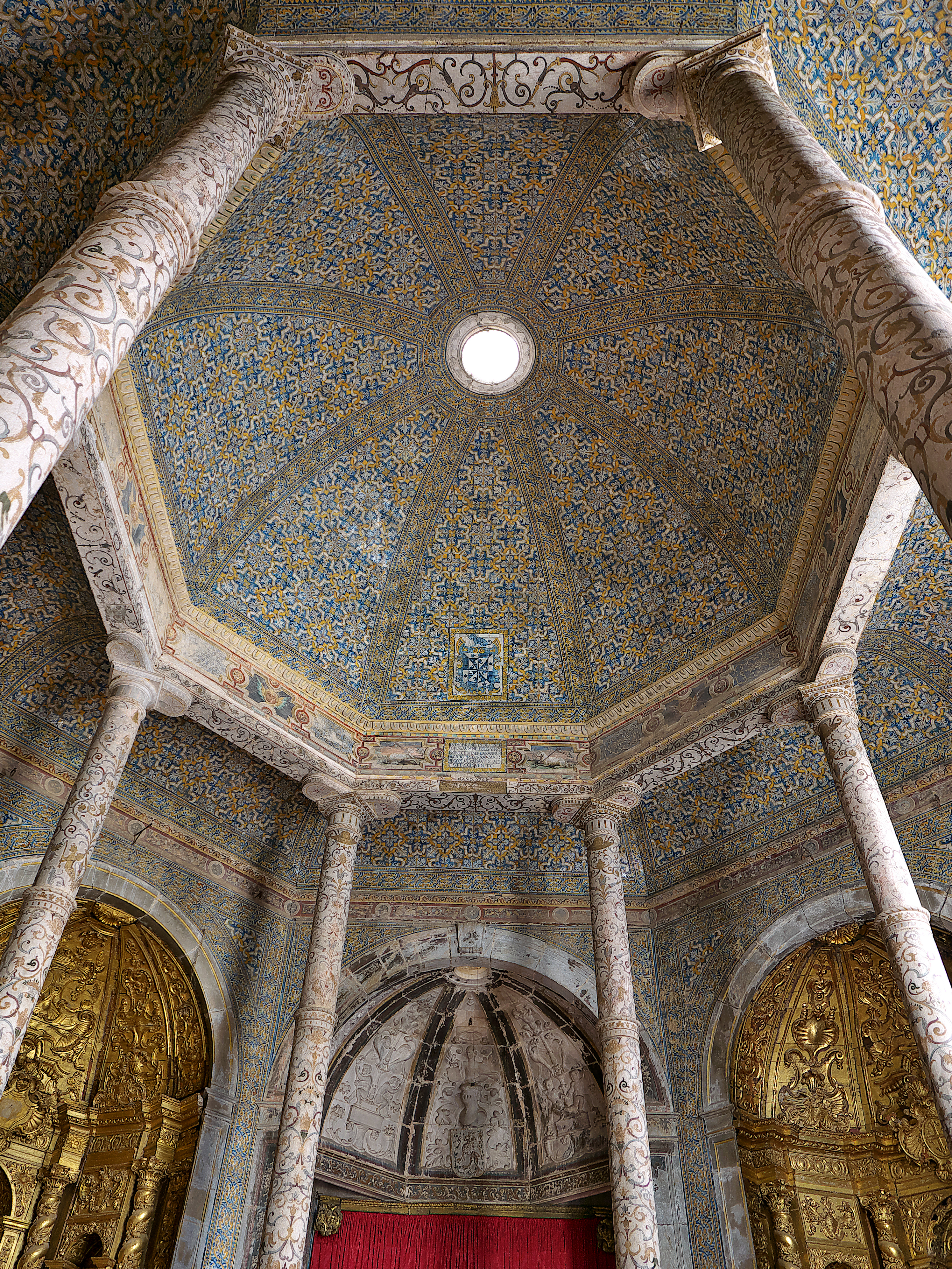 Diego de Torralva (1543-1557). A su rica decoración añadimos la característica de su planta octogonal centralizada, que evoca la arquitectura de la Orden del Temple.